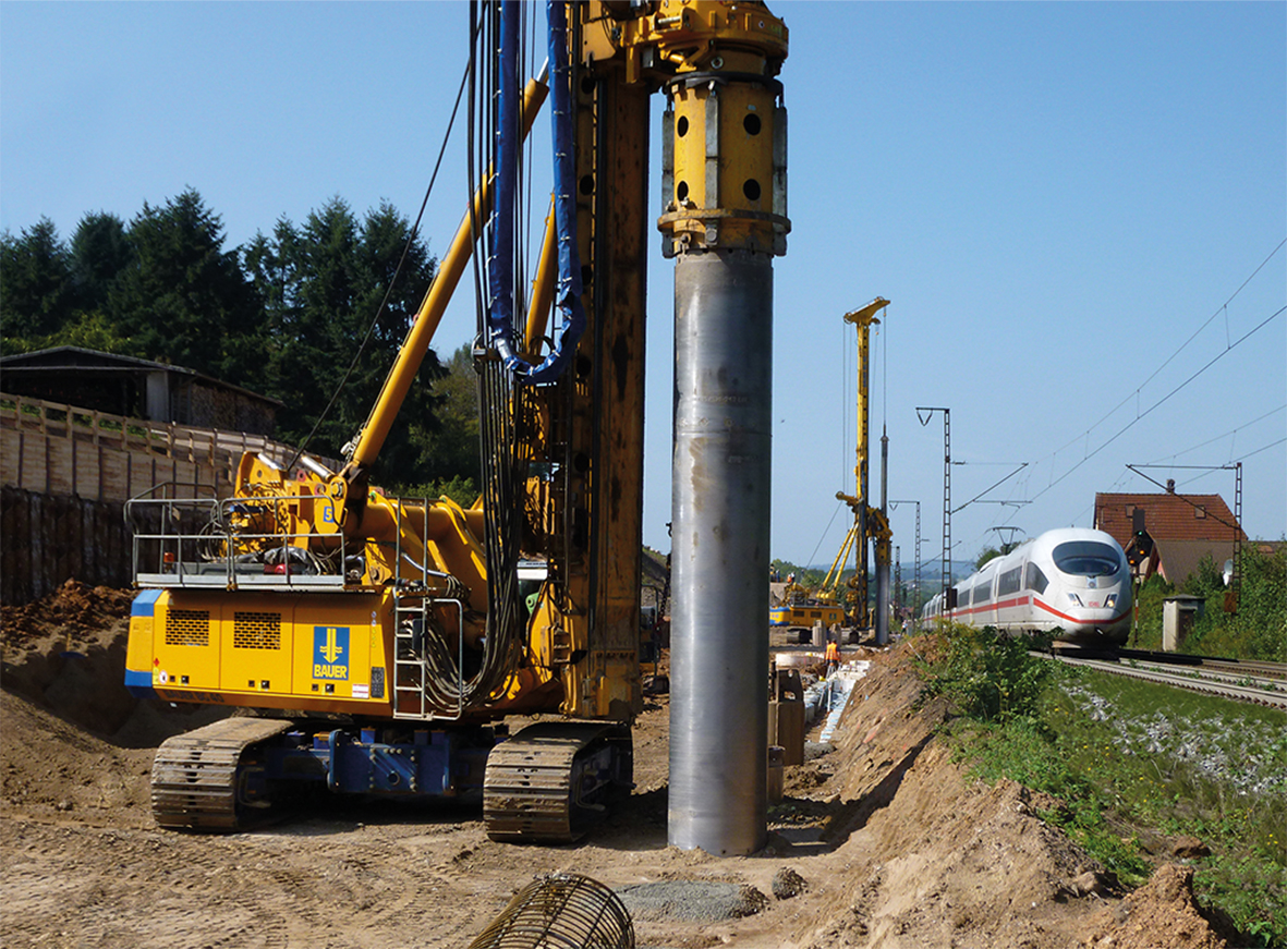 Das Bahnprojekt Umfahrung Schwarzkopftunnel im Spessart stellt 2014 den bislang größten Auftrag für das Segment Bau in Deutschland dar.